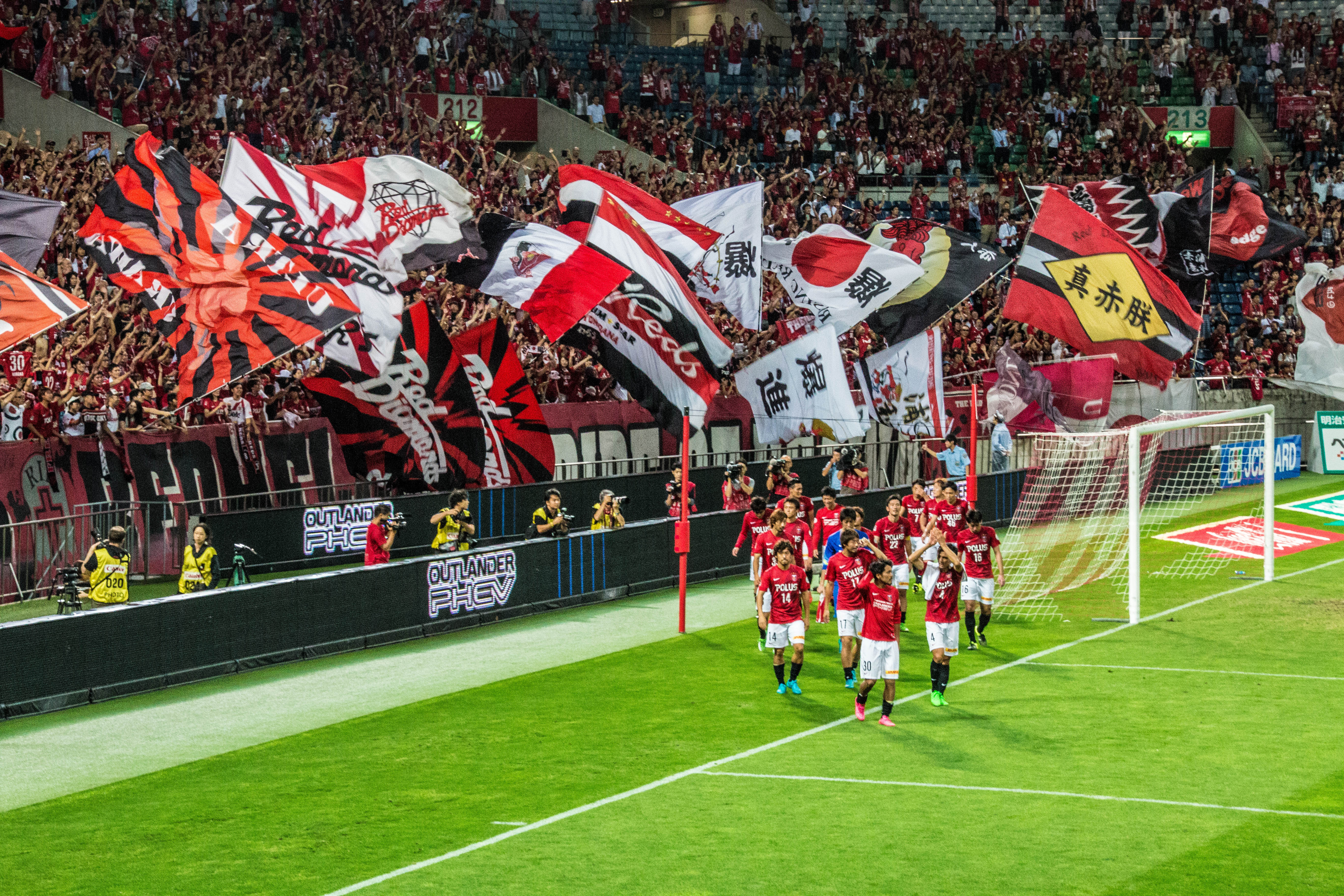 Urawa Reds at Saitama Stadium